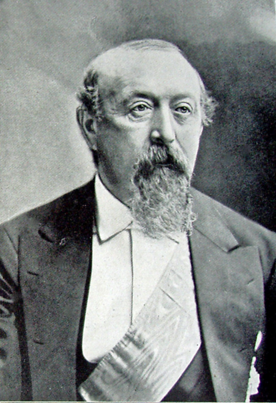 Christian Emil Greve Krag-Juel-Vind-Frijs, (født 8. december 1817 på Frijsenborg død 12. oktober 1896, var en dansk godsejer og politiker.